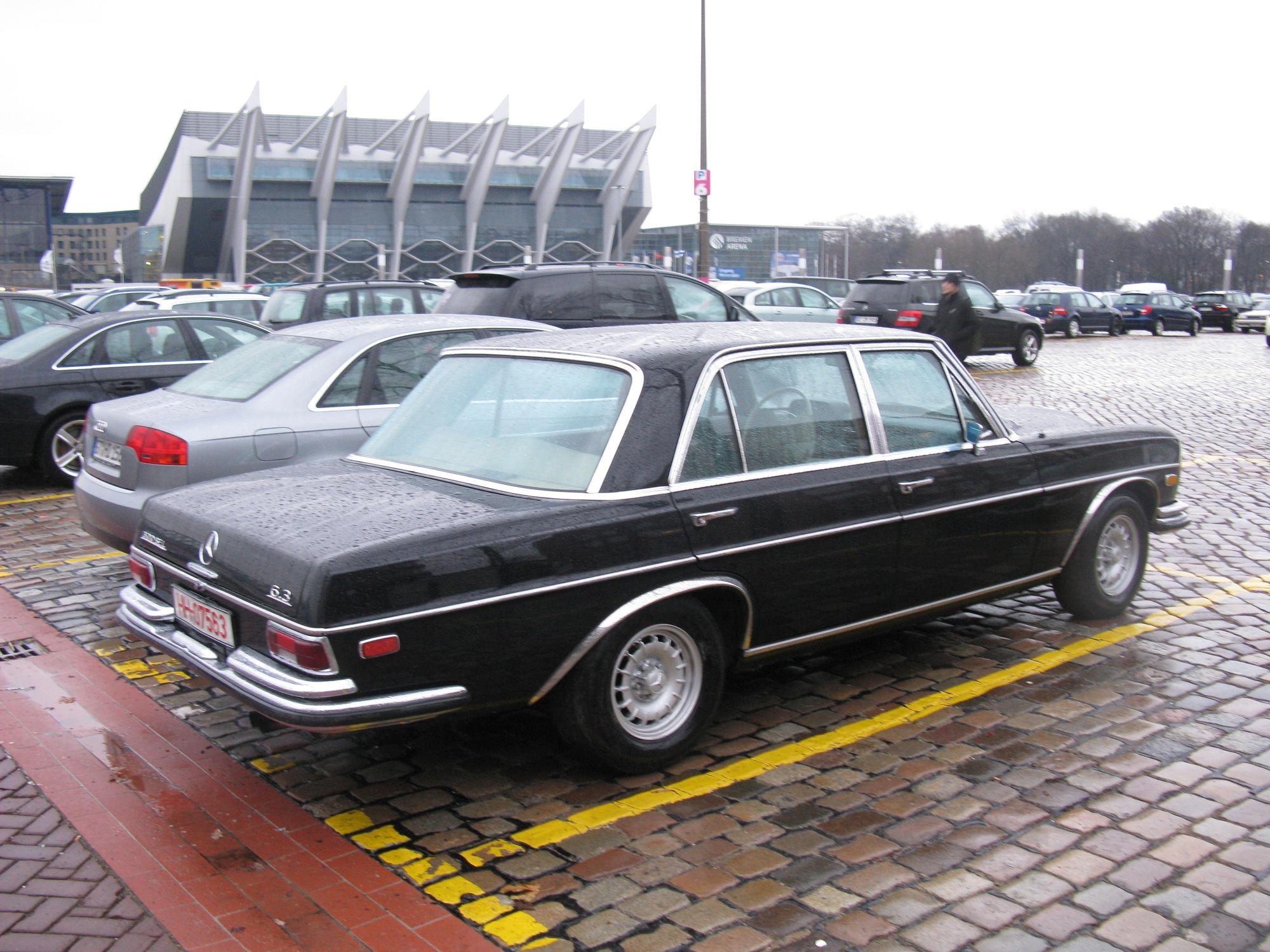 Mercedes-Benz 300 SEL 6.3